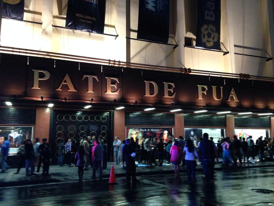 Presentación del disco Pelicula Muda Primera Parte en Teatro Metropólitan Ciudad de México